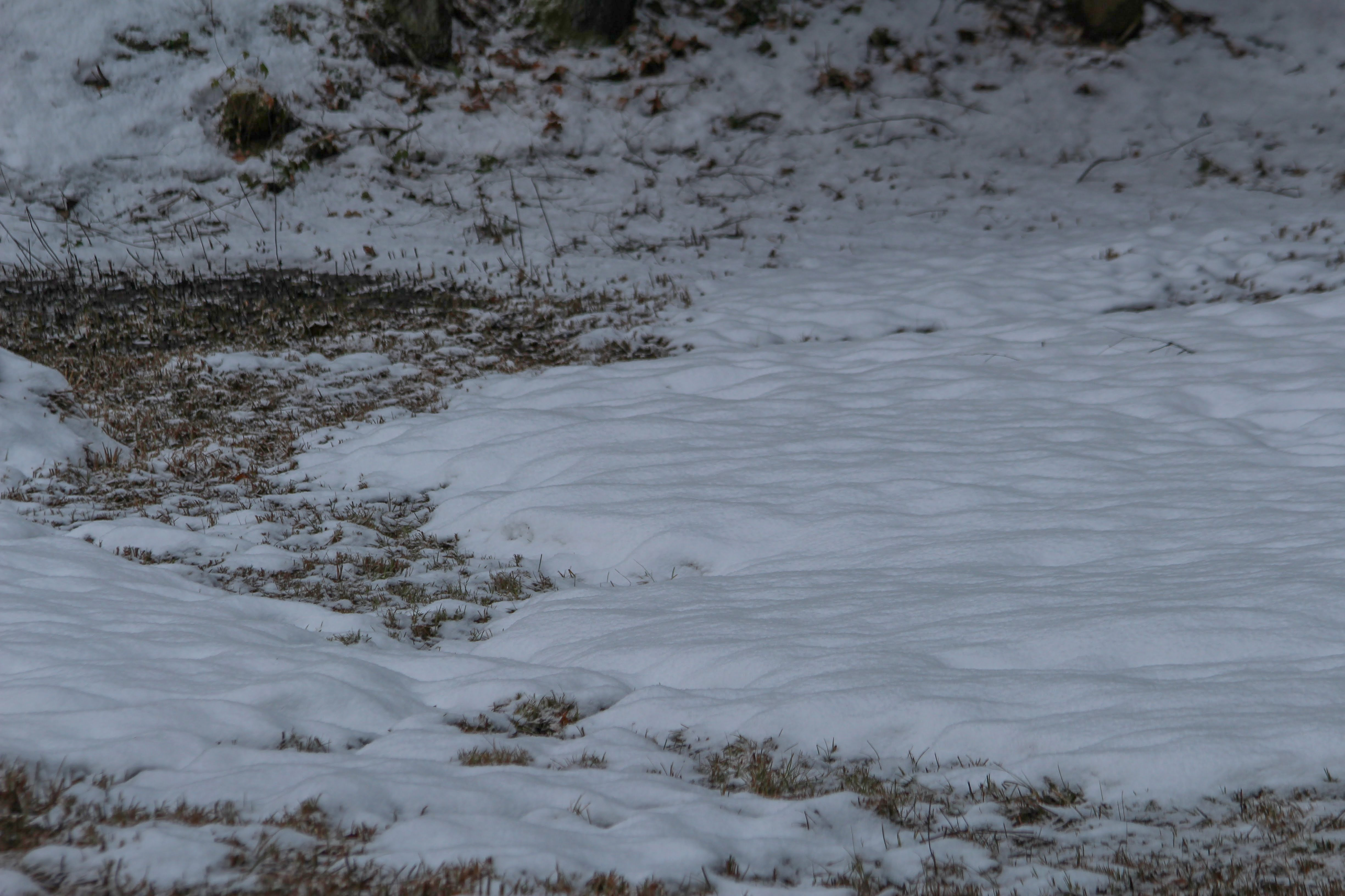 PP Kyčmol v prosinci 2017